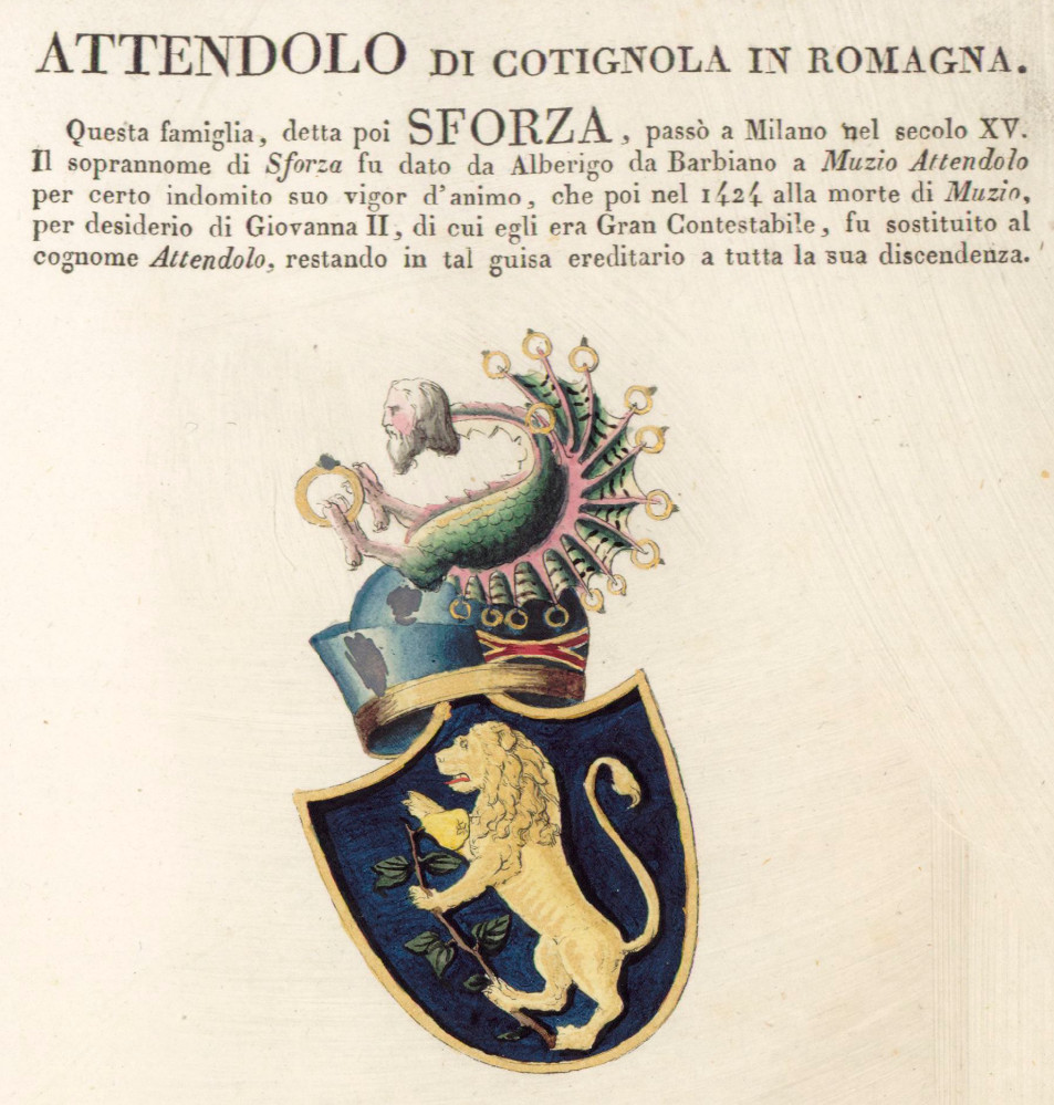 Stemma famiglia Attendolo